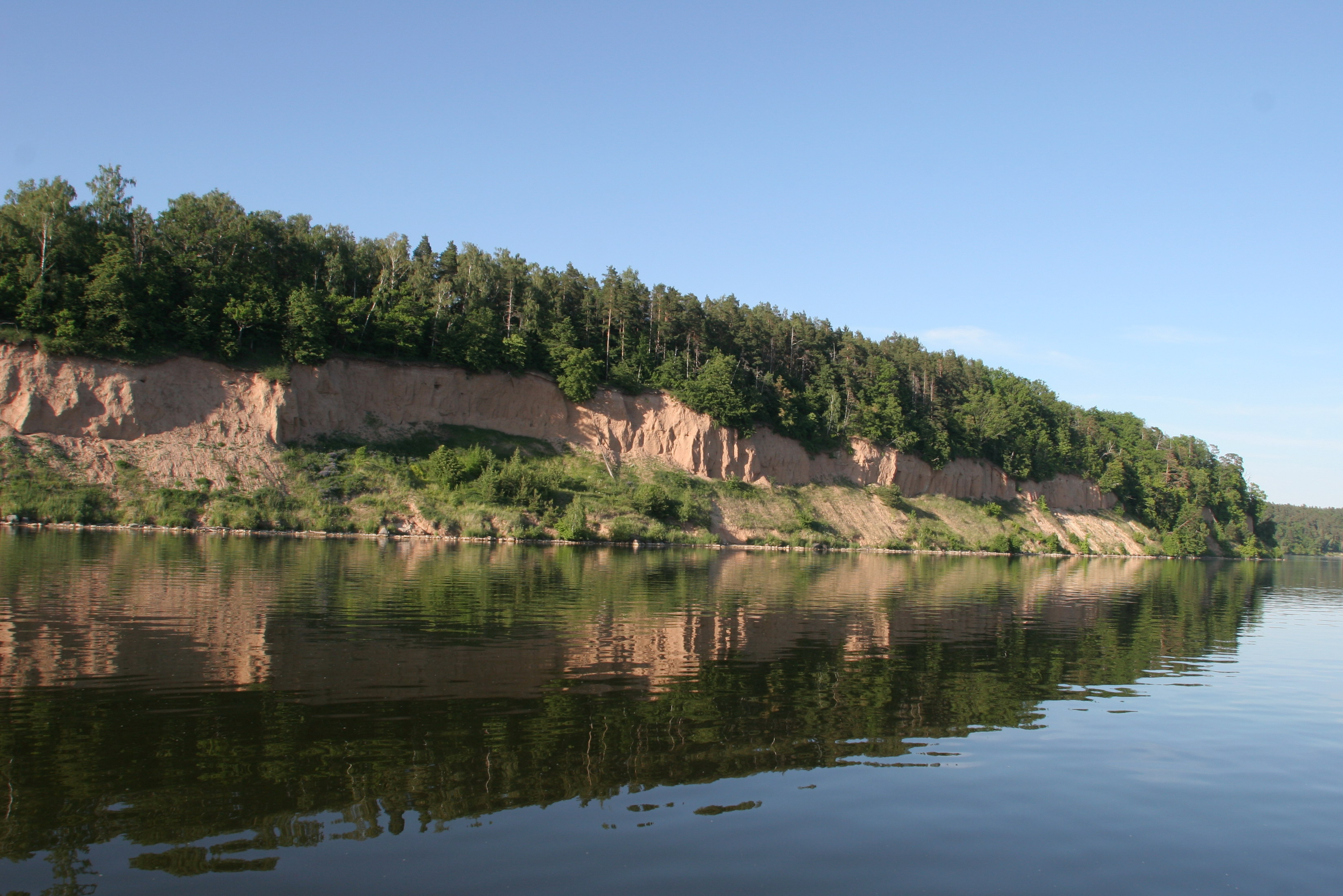 Kauno marių pakrantė.